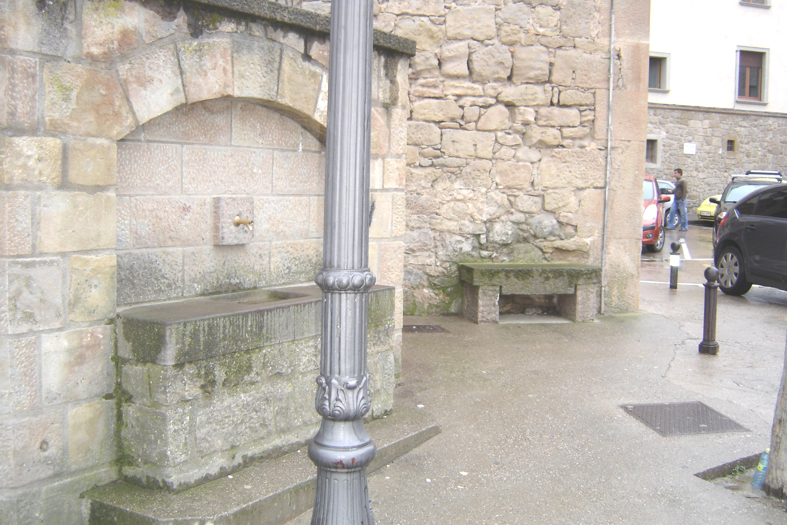 La font dels Safarejos, a Solsona, (Solsonès)